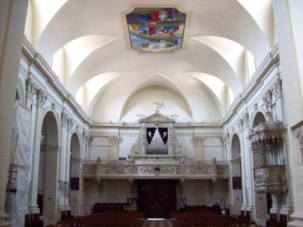 Pordenone - Duomo di San Marco, interno